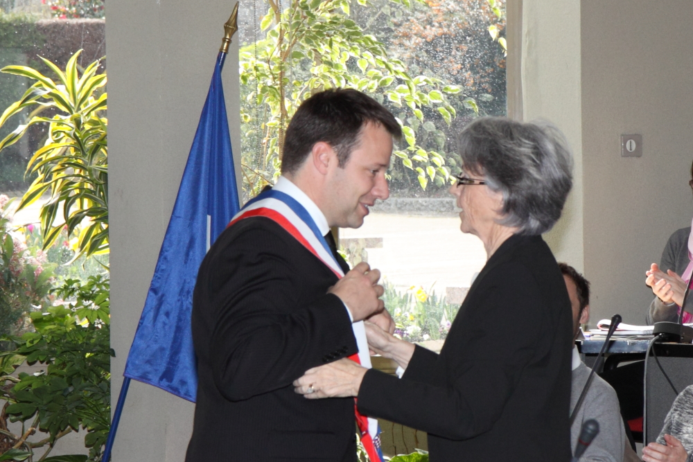 Installation du maire après les élections municipales de mars 2014. Maryvonne Thessier remet son écharpe de maire à Loïg Chesnais-Girard